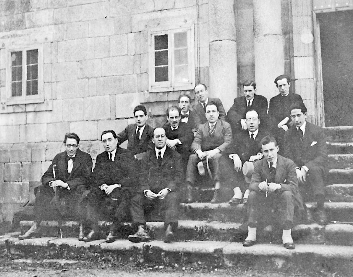 Asistentes á IV Asemblea das Irmandades da Fala (Monforte de Lemos, 18-20 de febreiro de 1922). Entre outros están: Castelao, Ánxel Casal, Antón Losada Diéguez, Antón Villar Ponte, Manuel Antonio, Roberto Blanco Torres e Ramón Otero Pedrayo.[1]